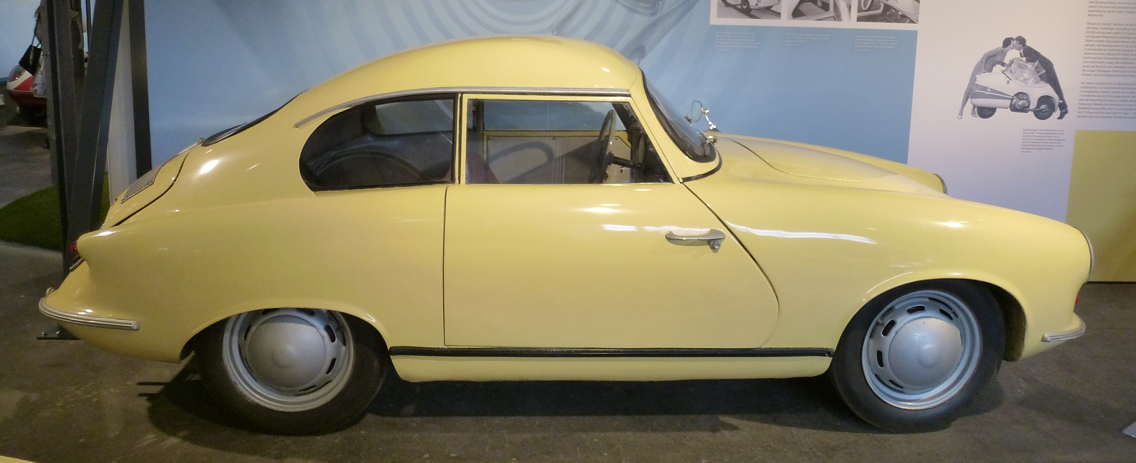 Weidner 70 S von 1958